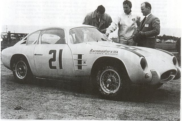 Bandini 750 GT Zagato, Daytona 1960 tratta dal libro Bandini (storia e automobili di Ilario Bandini)